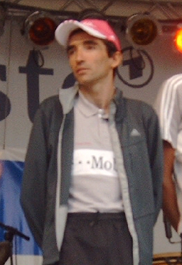 Giuseppe Guerini nach der Deutschlandtour 2005 in Bonn Aufnahme: 23.8. 2005 Url